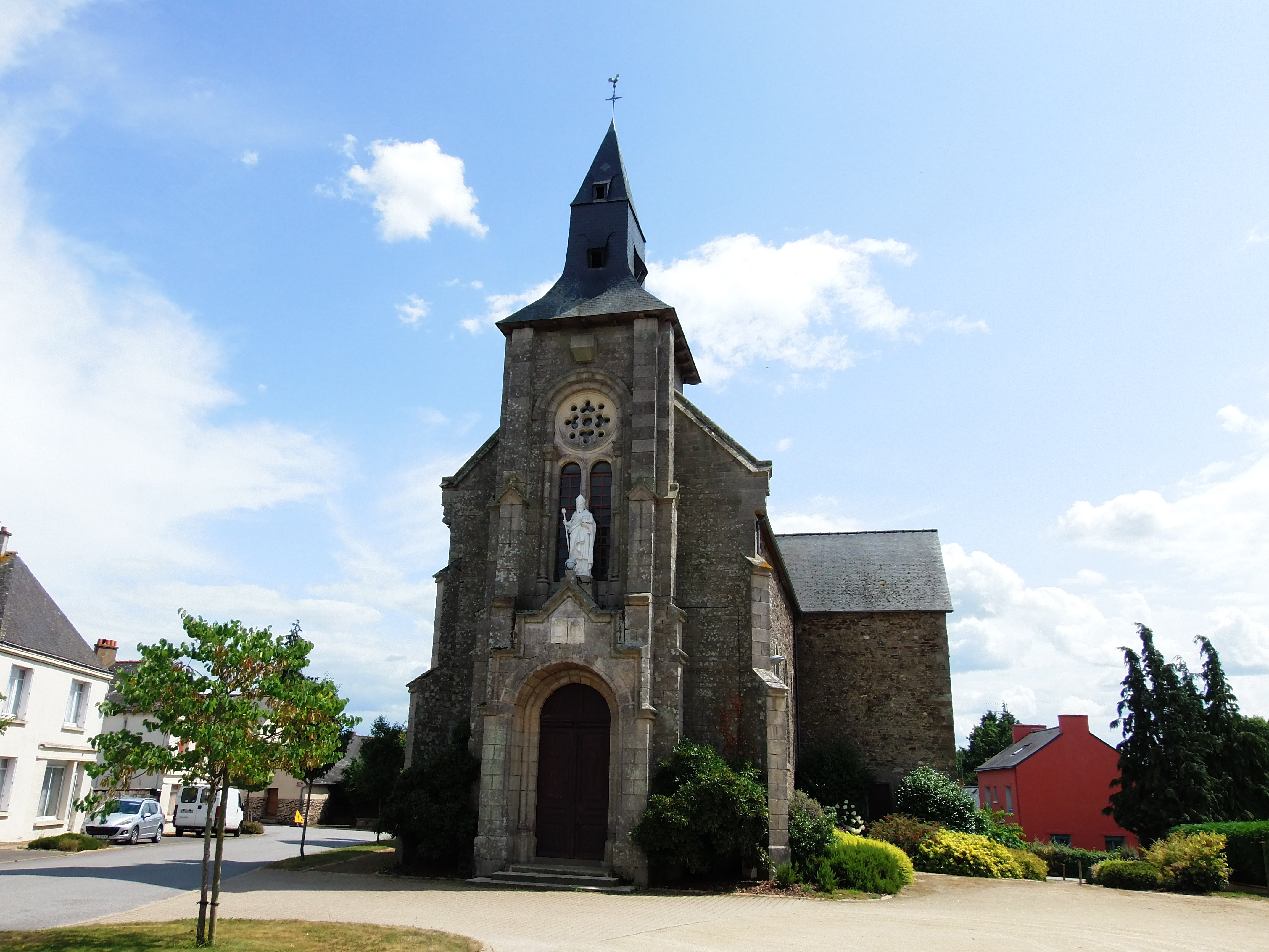 Vue de l'entrée de l'Église.